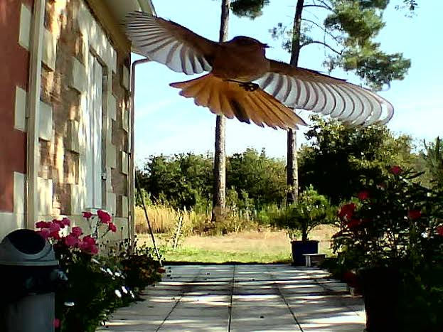 Photographié en vol par une caméra de surveillance en Gironde.